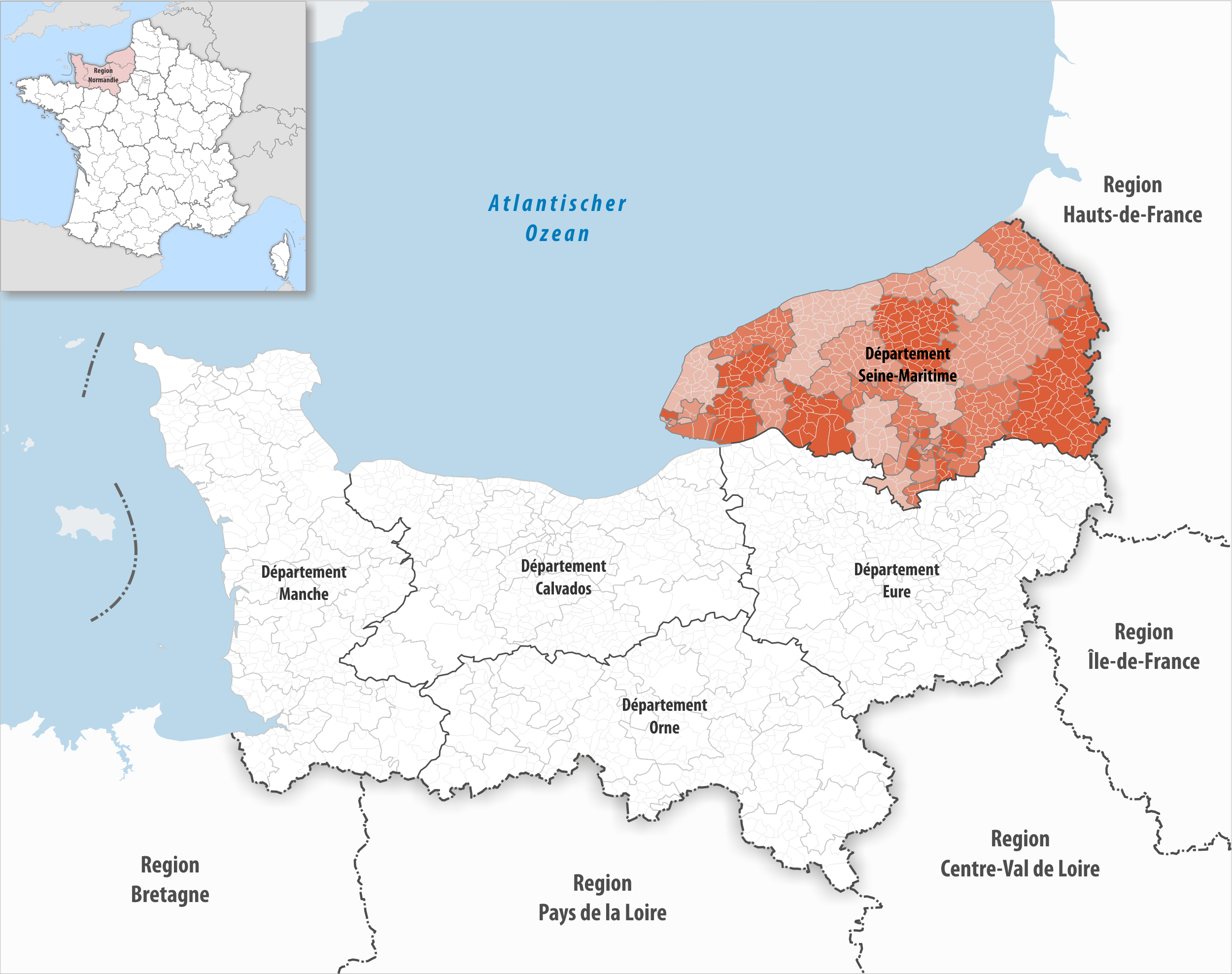 Lage des Departements Seine-Maritime